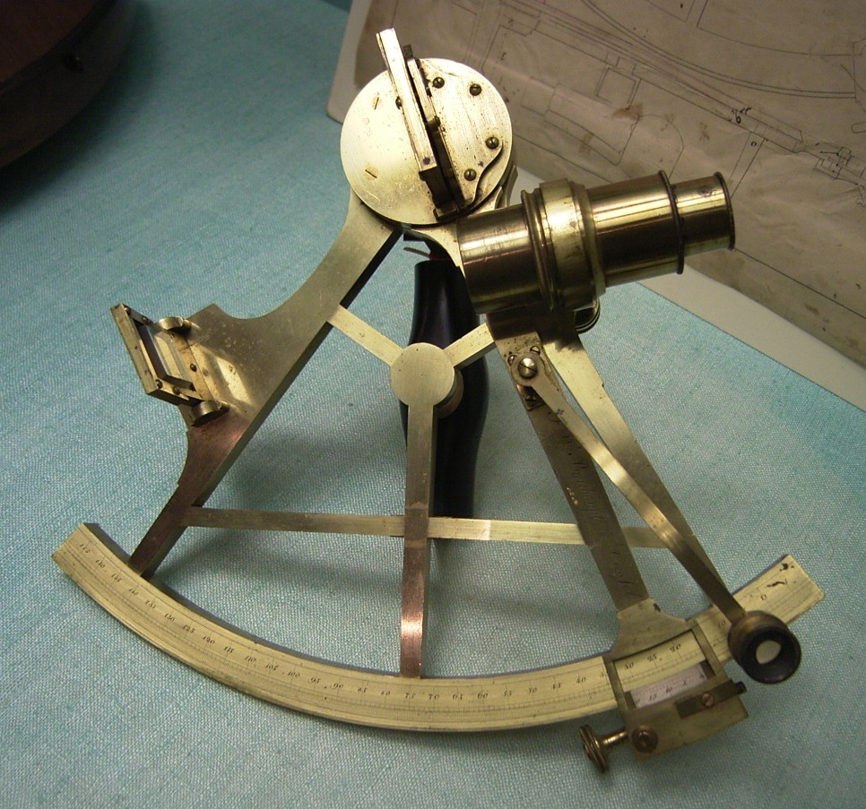 Spiegelsextant um 1810, Fa. Breithaupt, Kassel, Deutschland Photograf: Benutzer:Hafenbar